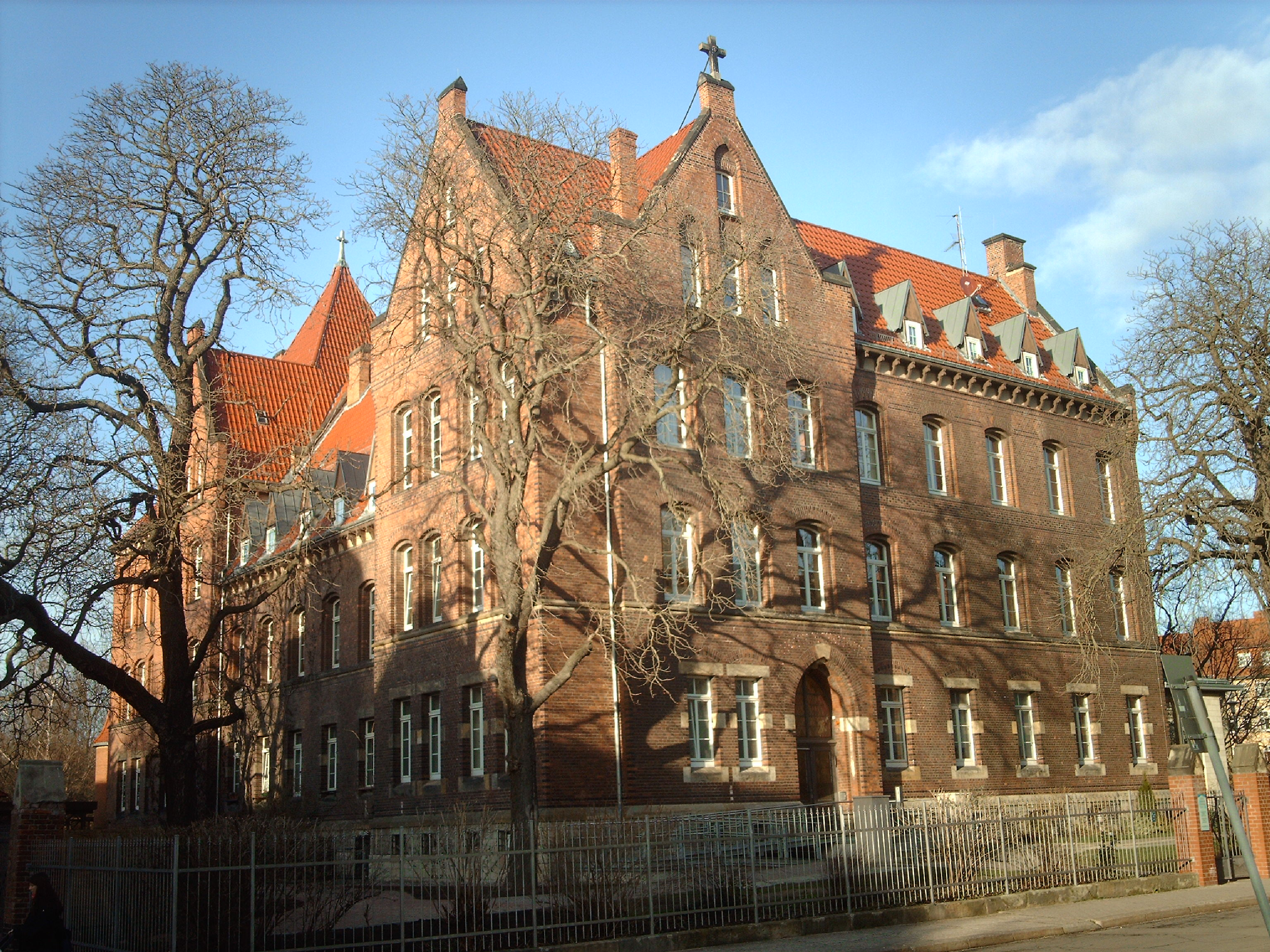 Augusta-Viktoria-Stift in Erfurt, Hospitalplatz. Im Bild Altersheim.